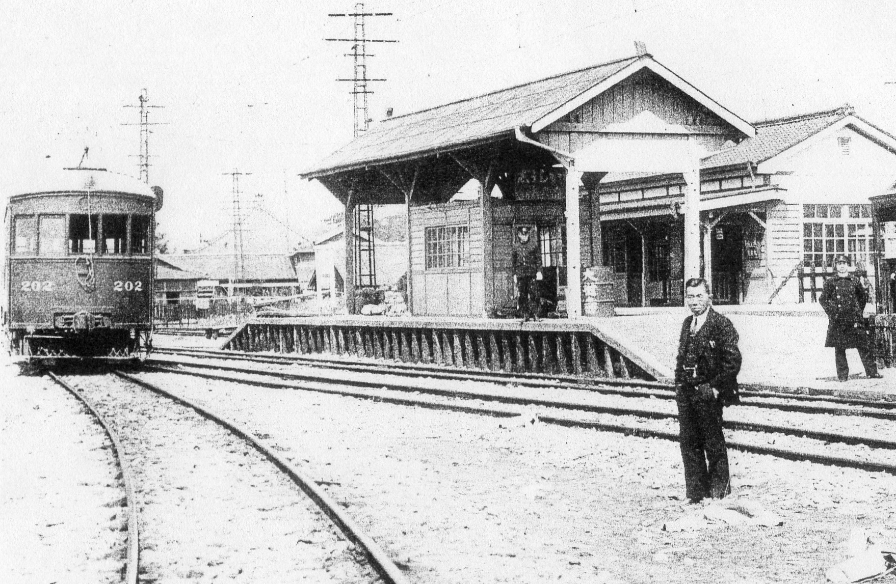 昭和12年ごろの大樹寺駅